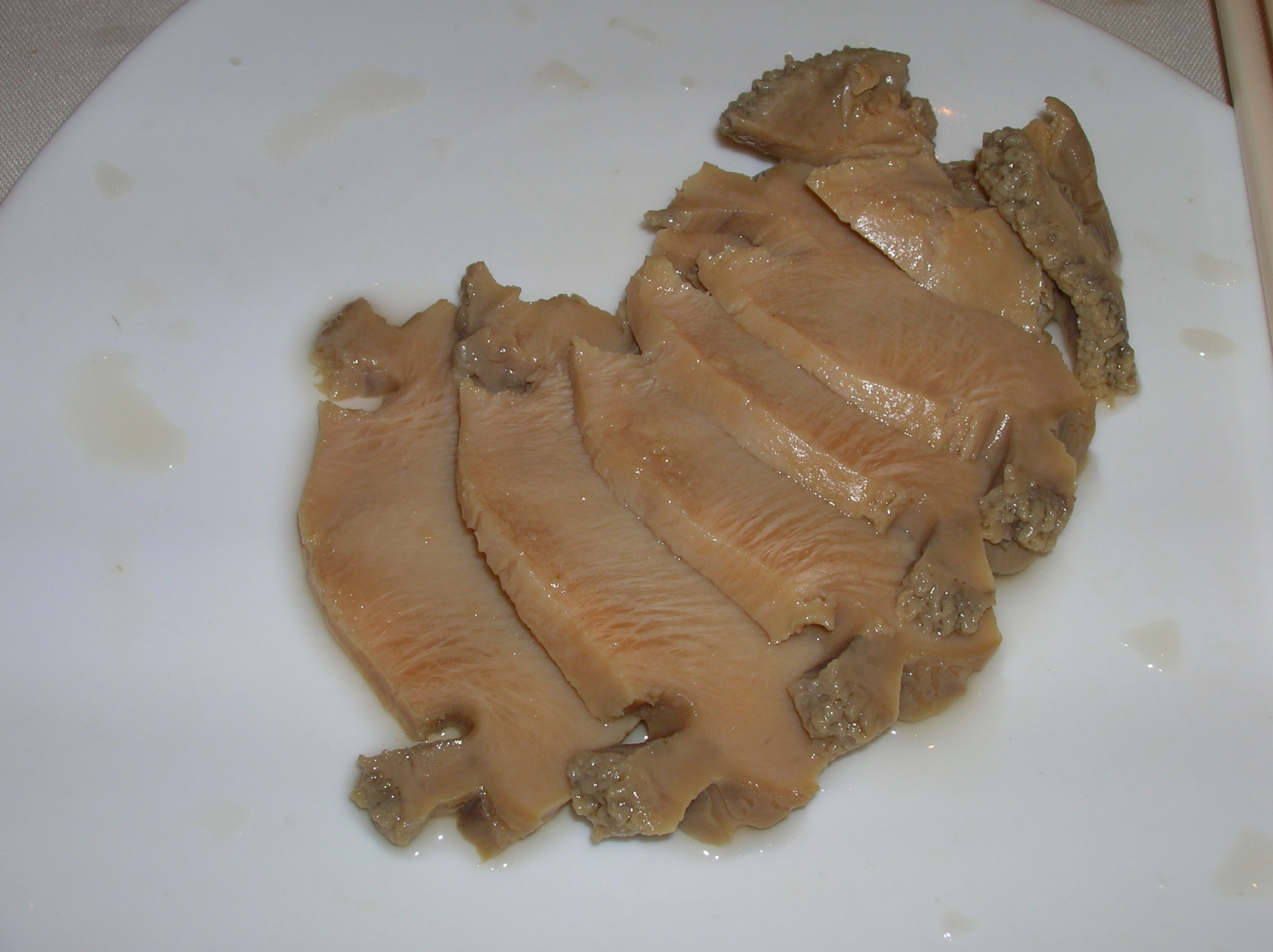 אבלונה במסעדת יונג קי בהונג קונג